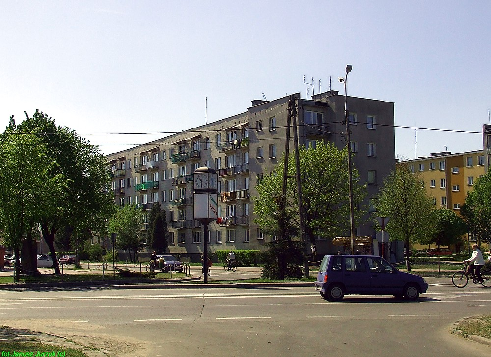 Tłuszcz